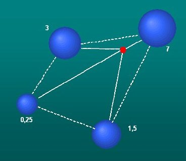 Centro di massa di un sistema di 4 punti di massa diversa. Immagine generata con MS Excel. L'autore dell'immagine ha effettuato l'upload e non ci sono problemi di copyright